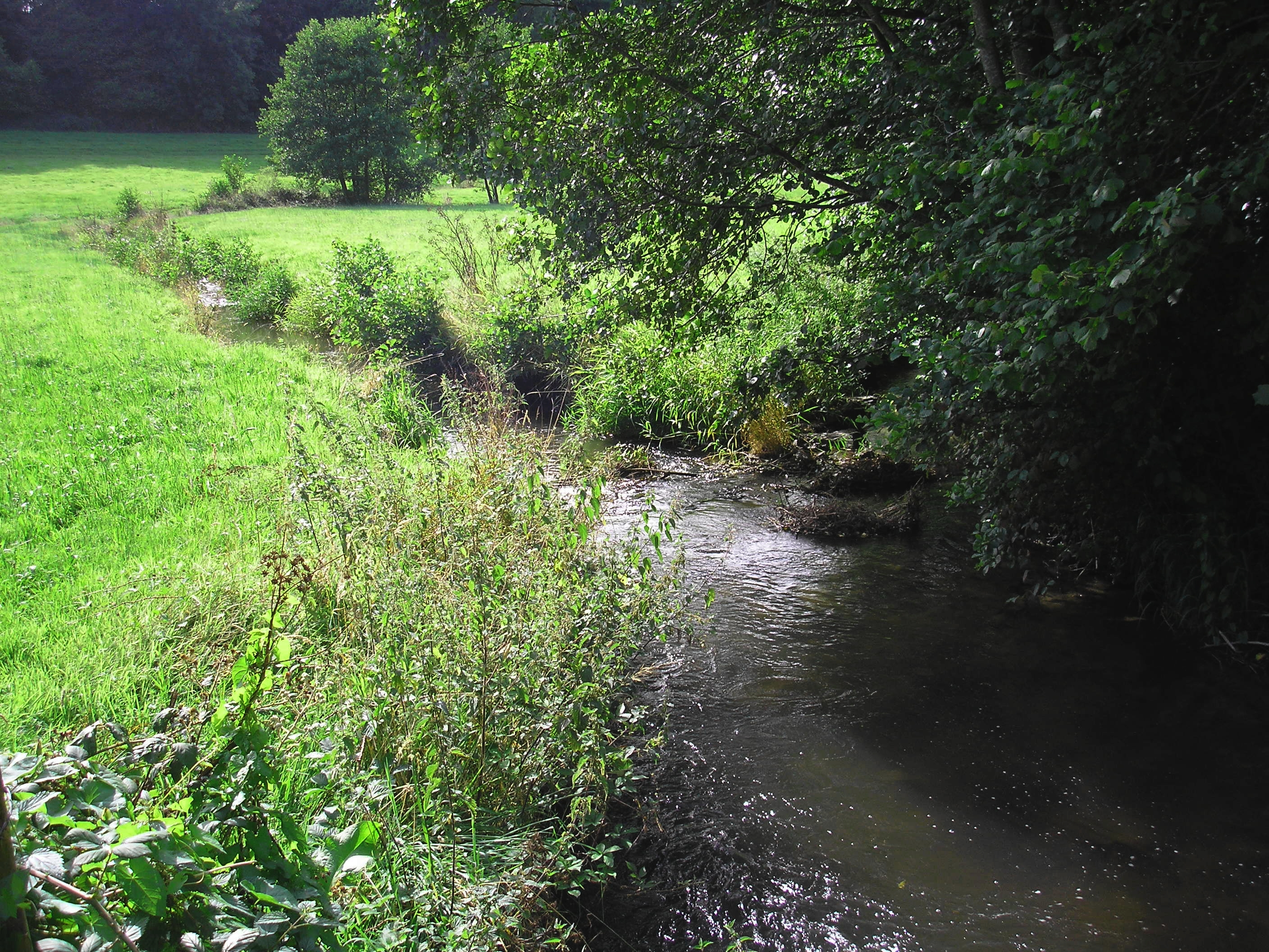 Saint-Jean-de-Savigny (Normandie, France). L'Elle.